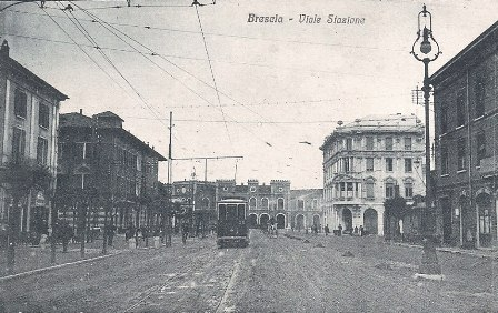 Brescia, viale Stazione (oggi via Vincenzo Foppa).